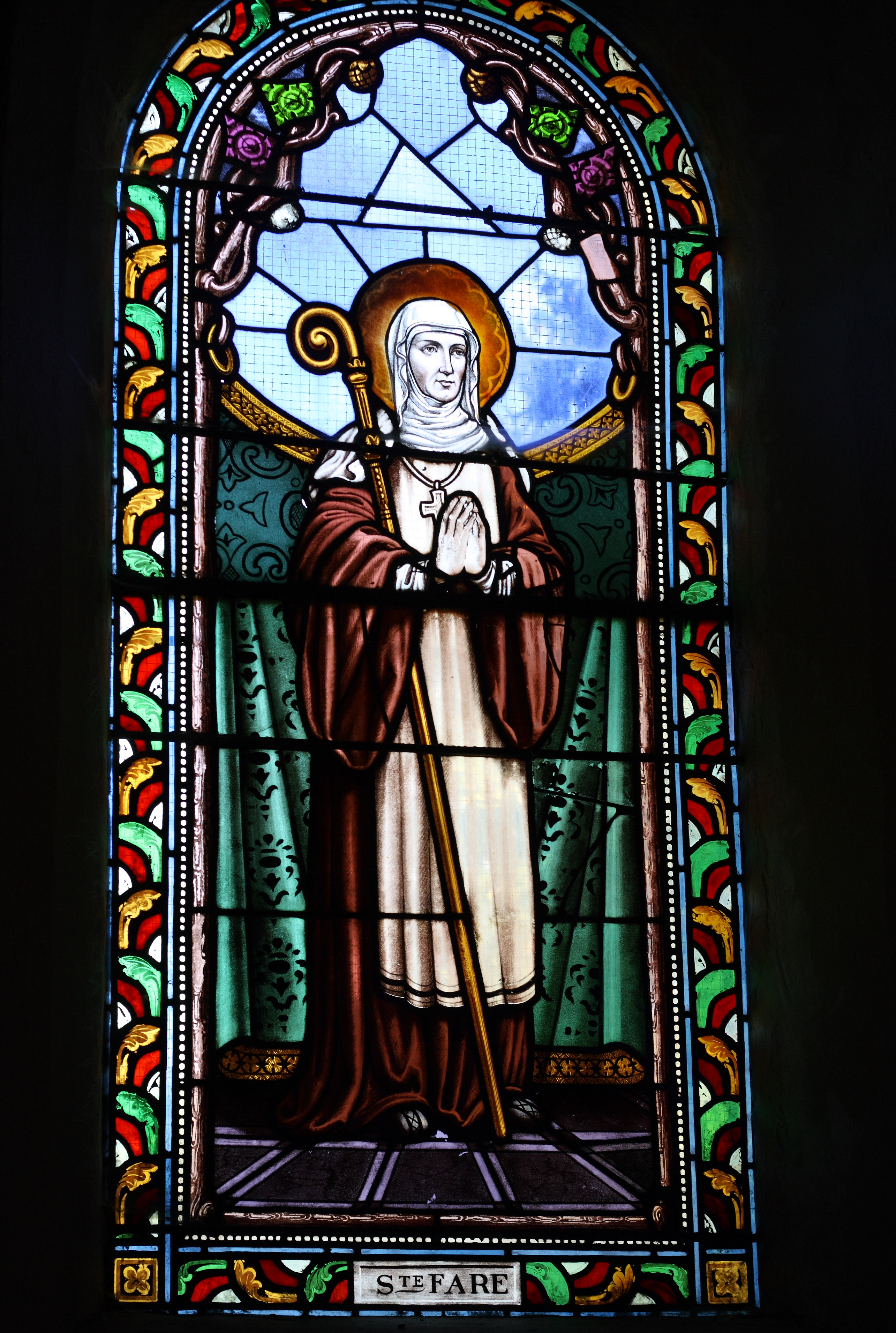 Katholische Kirche Saint-Sulpice in La Celle-sur-Morin im Département Seine-et-Marne in der Region Île-de-France (Frankreich), Bleiglasfenster, Darstellung: hl. Fara (Burgundofara), Äbtissin im 7. Jahrhundert in Faremoutiers